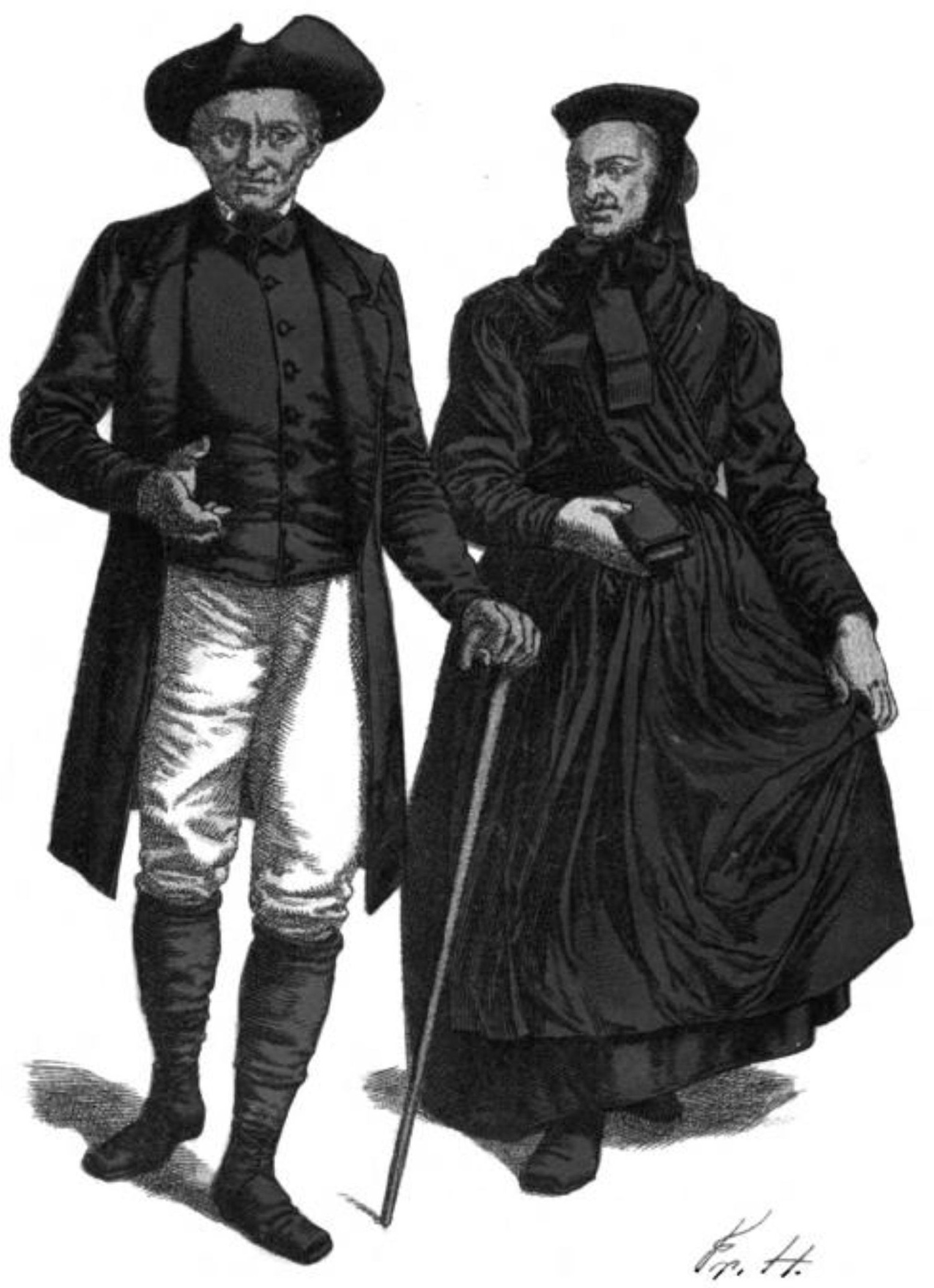 Friedrich Hottenroth: Nassauisches Trachtenbuch Tafel 17: Bauersleute aus Schupbach (Oberlahnkreis)